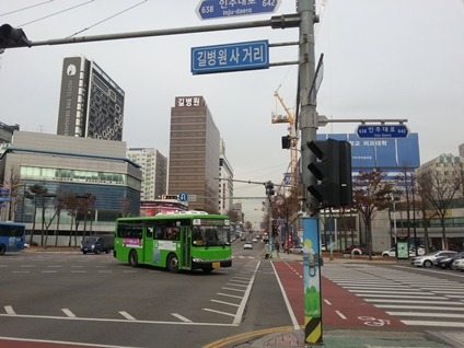 길병원사거리 . 인천광역시 남동구 구월동에 소재한 교차로 중 하나. '남동대로'와 '인주대로'가 교차한다.